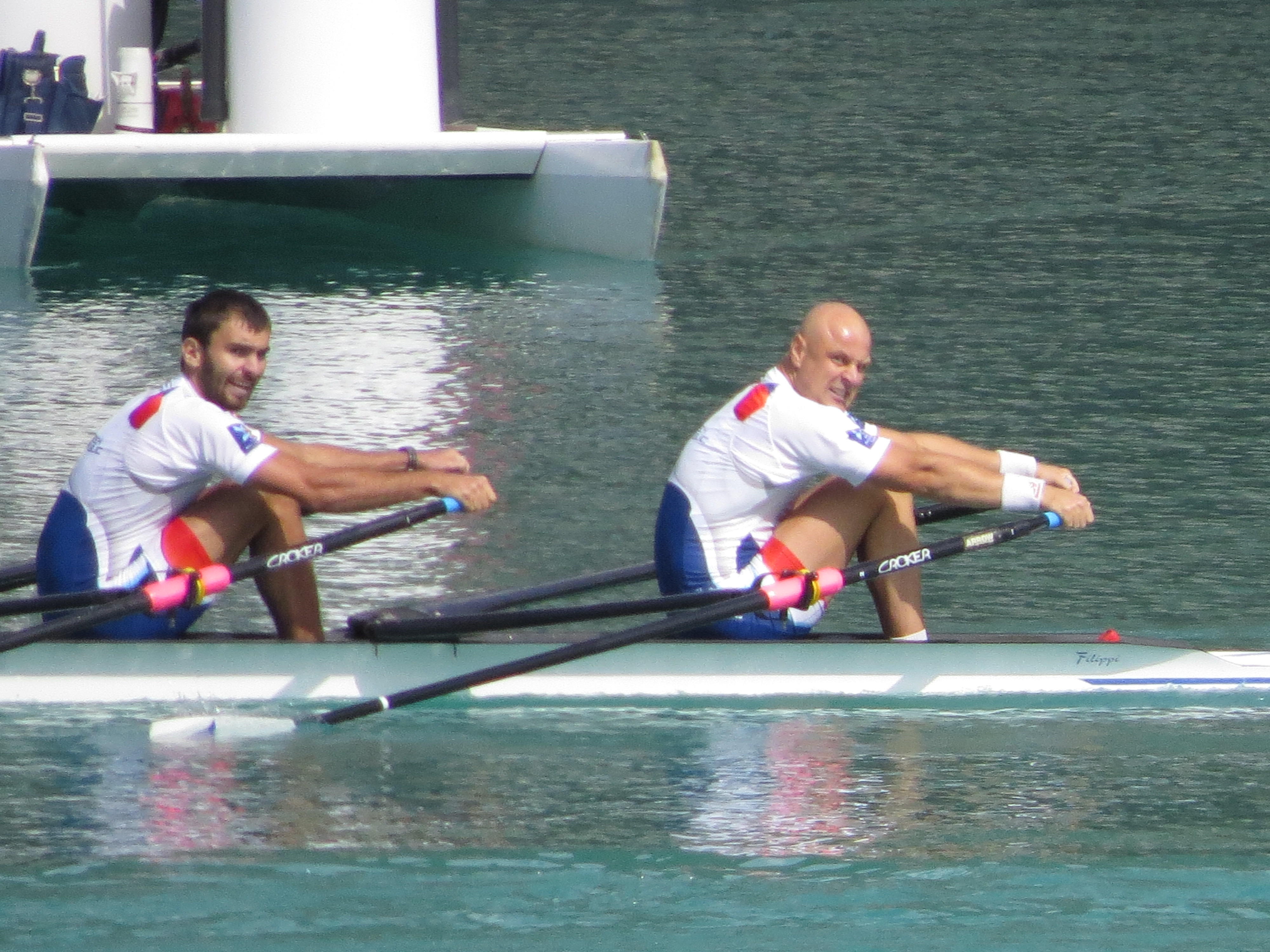 Demi-finale C/D M2x CZE : PLOCEK, Michal JIRKA, David